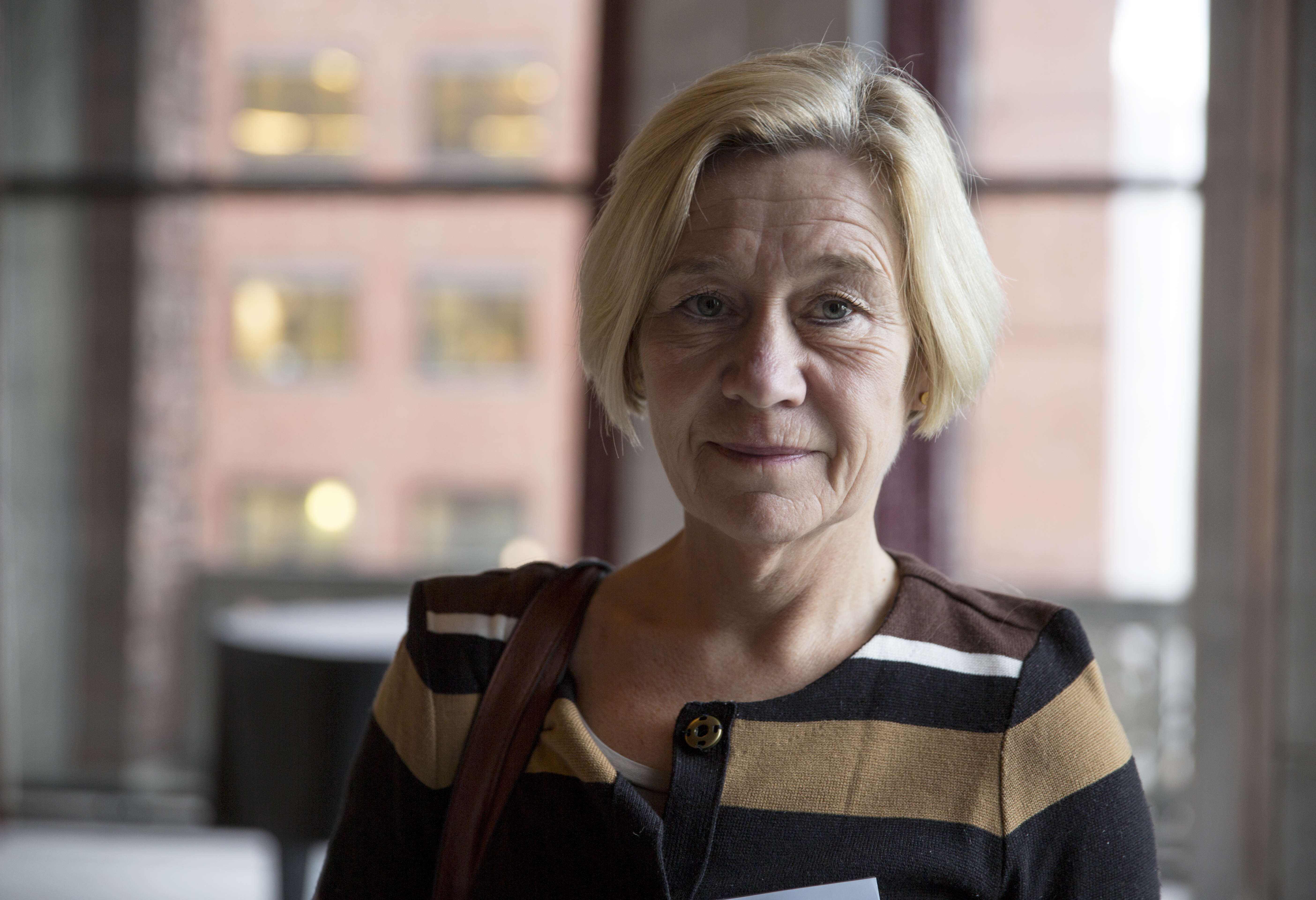 Anneli Hulthén, kommunstyrelsens ordförande i Göteborg, fotograferat 2013-10-17. Photo: News Øresund - Jenny Andersson © News Øresund(CC BY 3.0) Detta verk av News Øresund är licensierat under en Creative Commons Erkännande 3.0 Unported-licens (CC BY 3.0). Bilden får fritt publiceras under förutsättning att källa anges. The picture can be used freely under the prerequisite that the source is given. News Øresund, Malmö, Sweden. Øresund är en oberoende regional nyhetsbyrå som ingår i projektet Øresund Media Platform som drivs av Øresundsinstituttet i partnerskap med Lunds universitet och Roskilde Universitet och med delfinansiering från EU (Interreg IV A Öresund) och 14 regionala; icke kommersiella aktörer.